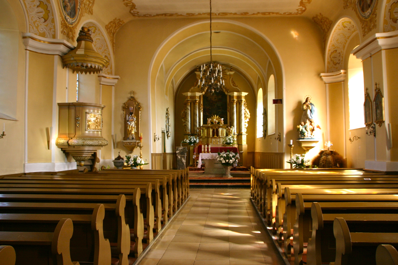 Biedrzychowice – wieś w Polsce położona w województwie opolskim, w powiecie prudnickim, w gminie Głogówek.